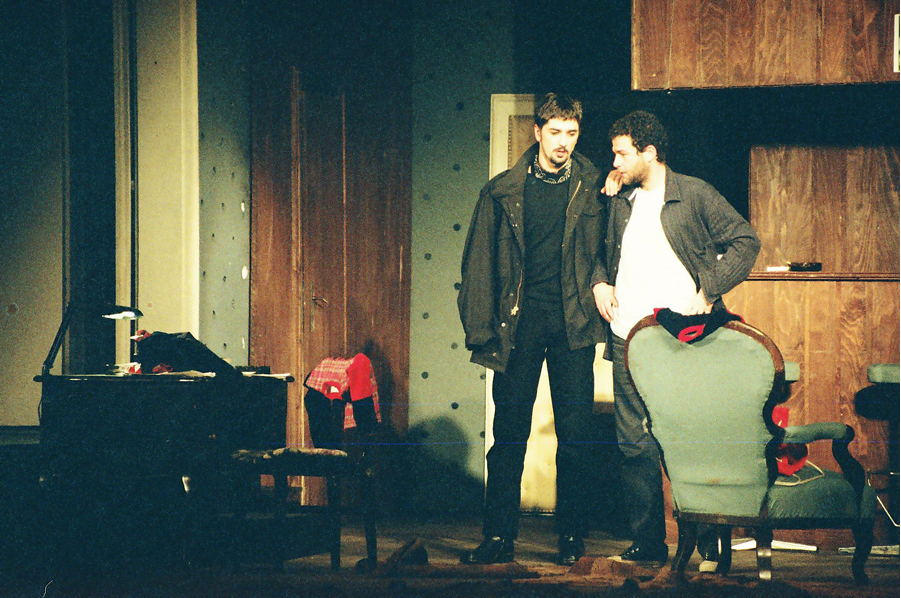 Nebojša Glogovac и Војин Ћетковић, представа У потпалубљу, 1996